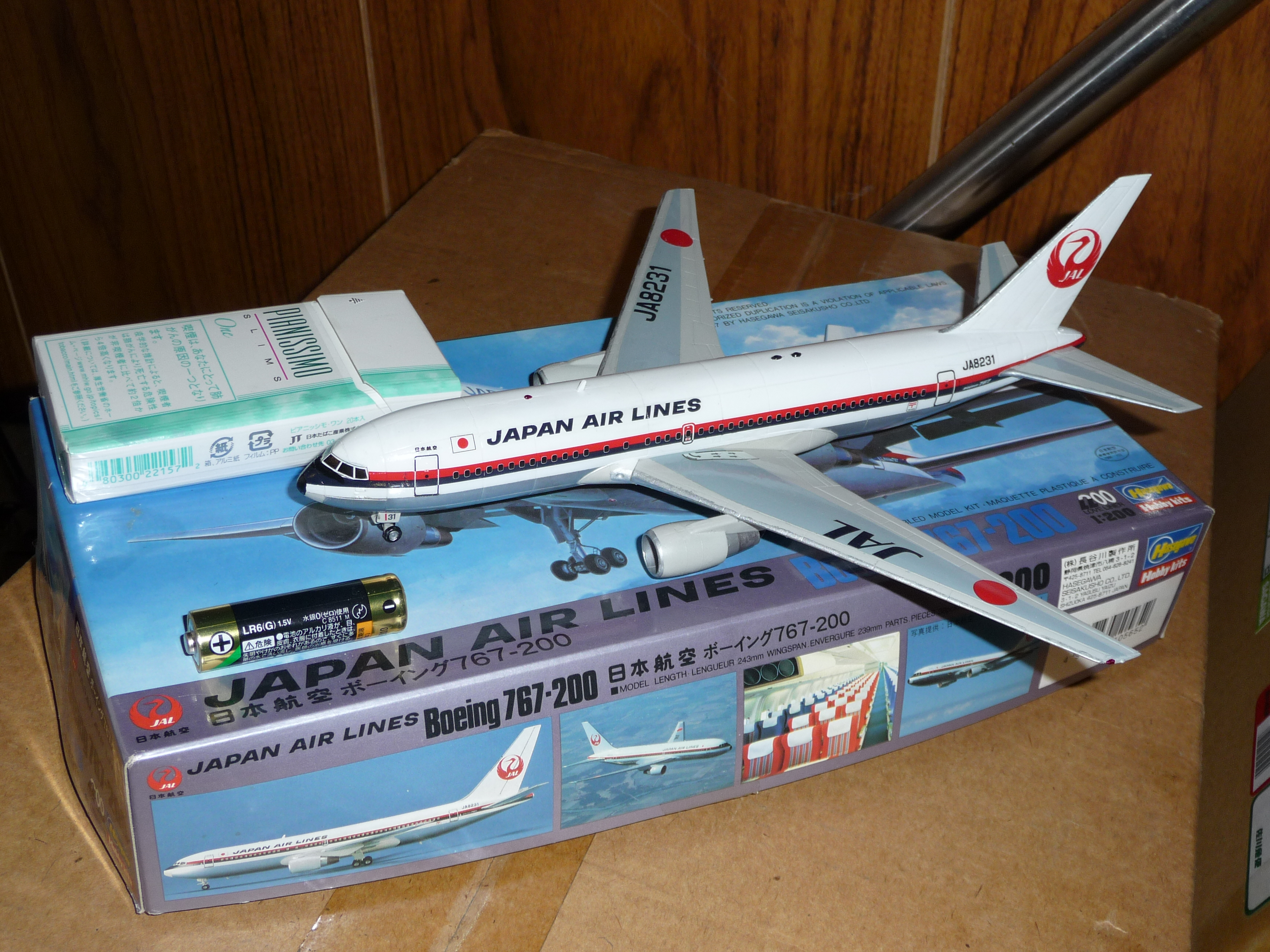 ハセガワ製の200分の1スケールのプラスチック製組立式モデル Chatama (talk)が、組立と塗装を施工 日本航空のボーイング767（旧塗装） 大きさの目安として、LR6乾電池とタバコの箱（ロングサイズ）を配置。